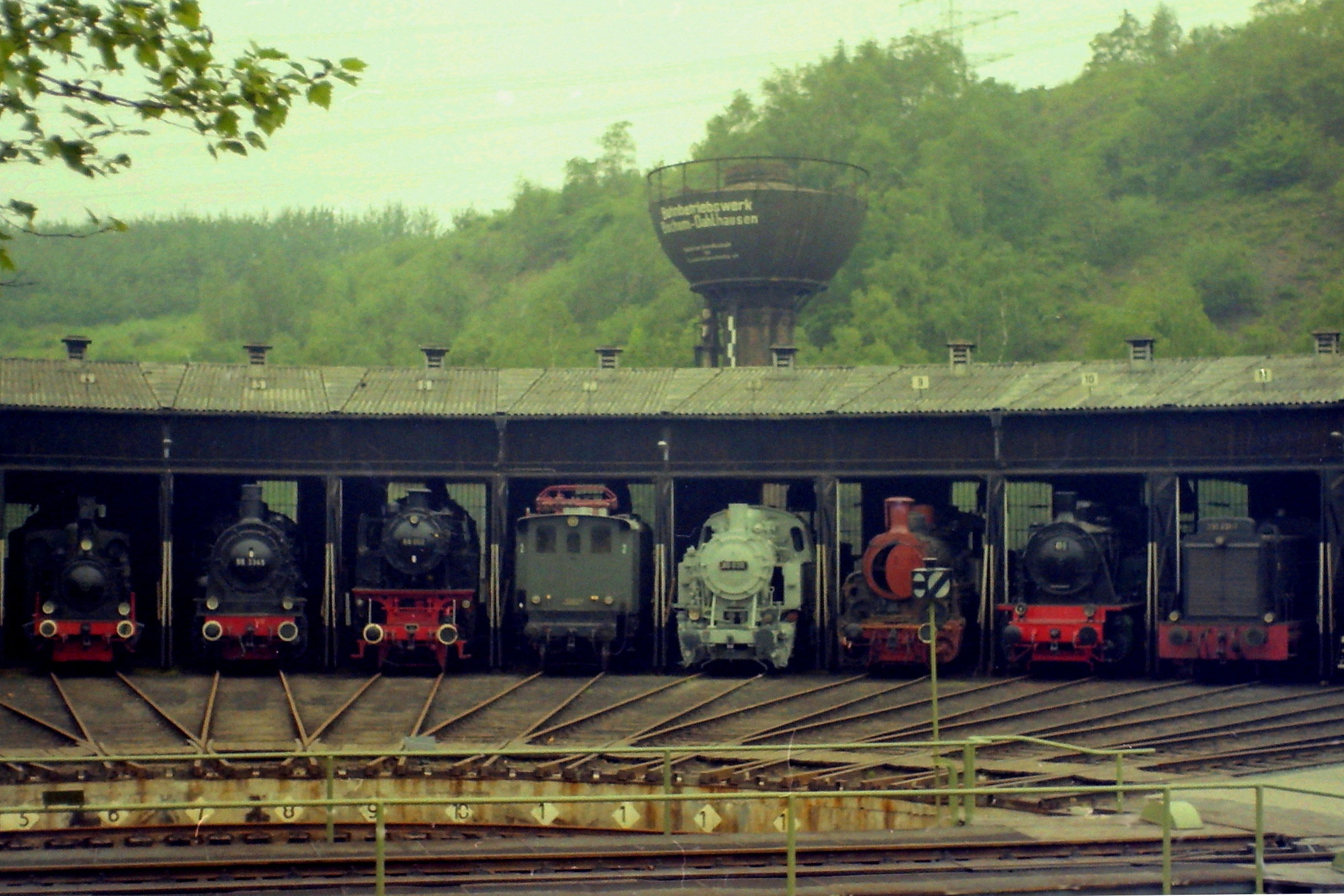 Lokomotivparade im Eisenbahnmuseum Bochum-Dahlhausen. This is a photograph of an architectural monument. 001